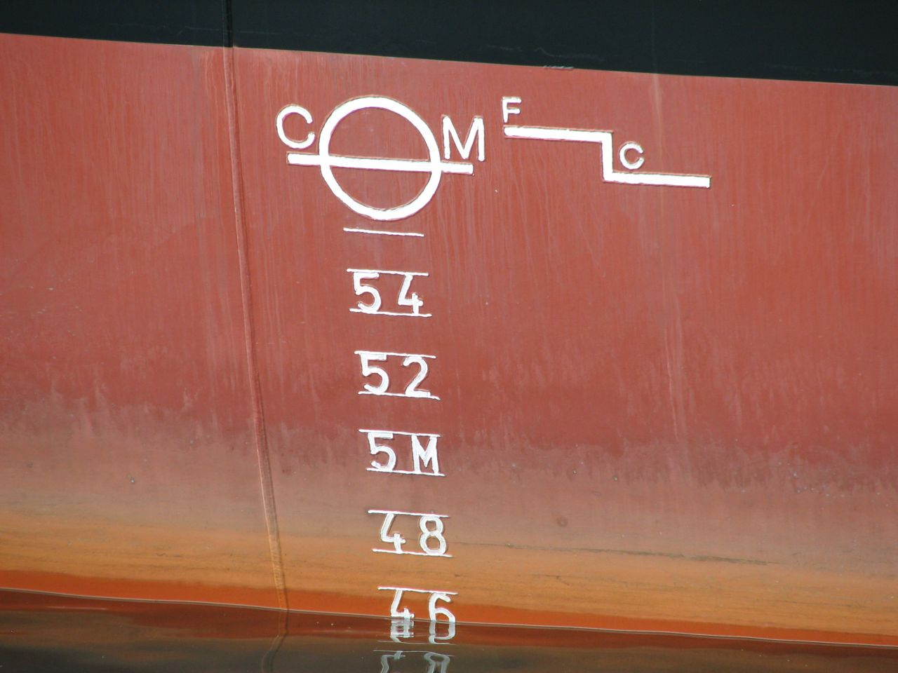 Flensburger Schiffbau Gesellschaft